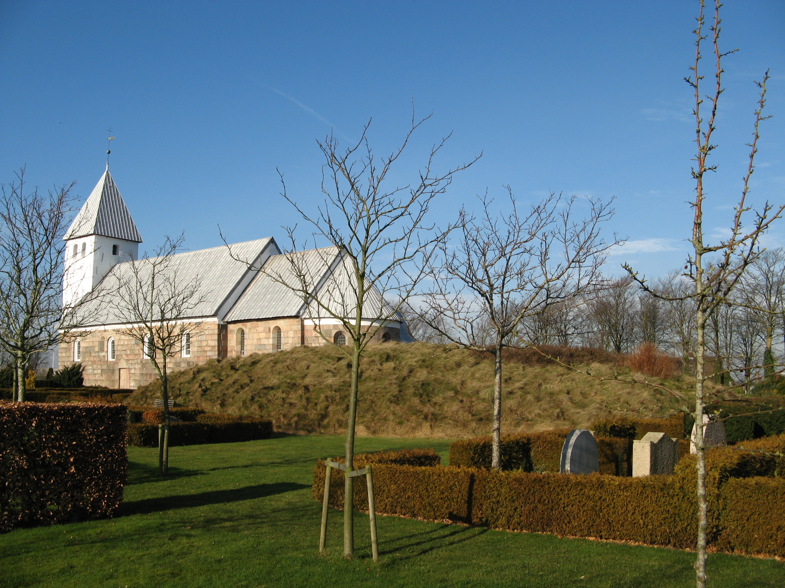 Bryndum kirke, Bryndum sogn, Esbjerg kommune (former: Skads Herred, Ribe Amt). Gravhøjen sydøst for kirken set fra sydøst.